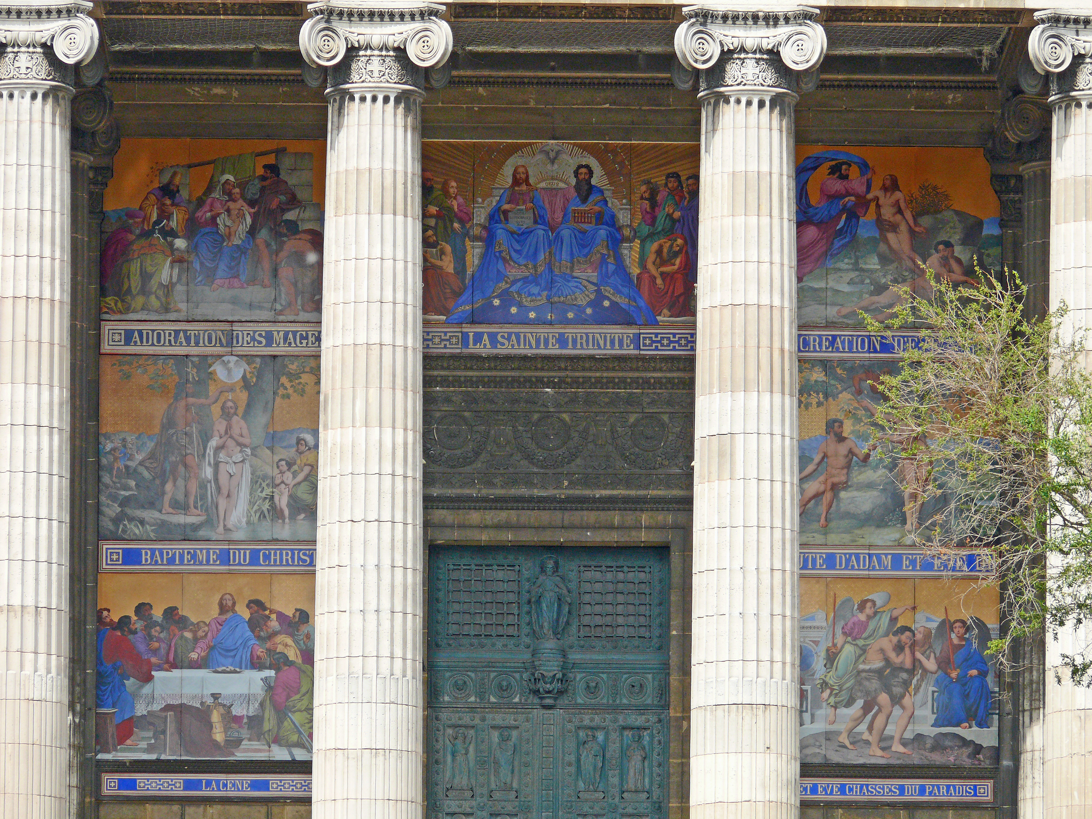 Paris - Église Saint-Vincent-de-Paul - Décor de la façade en plaques émaillées